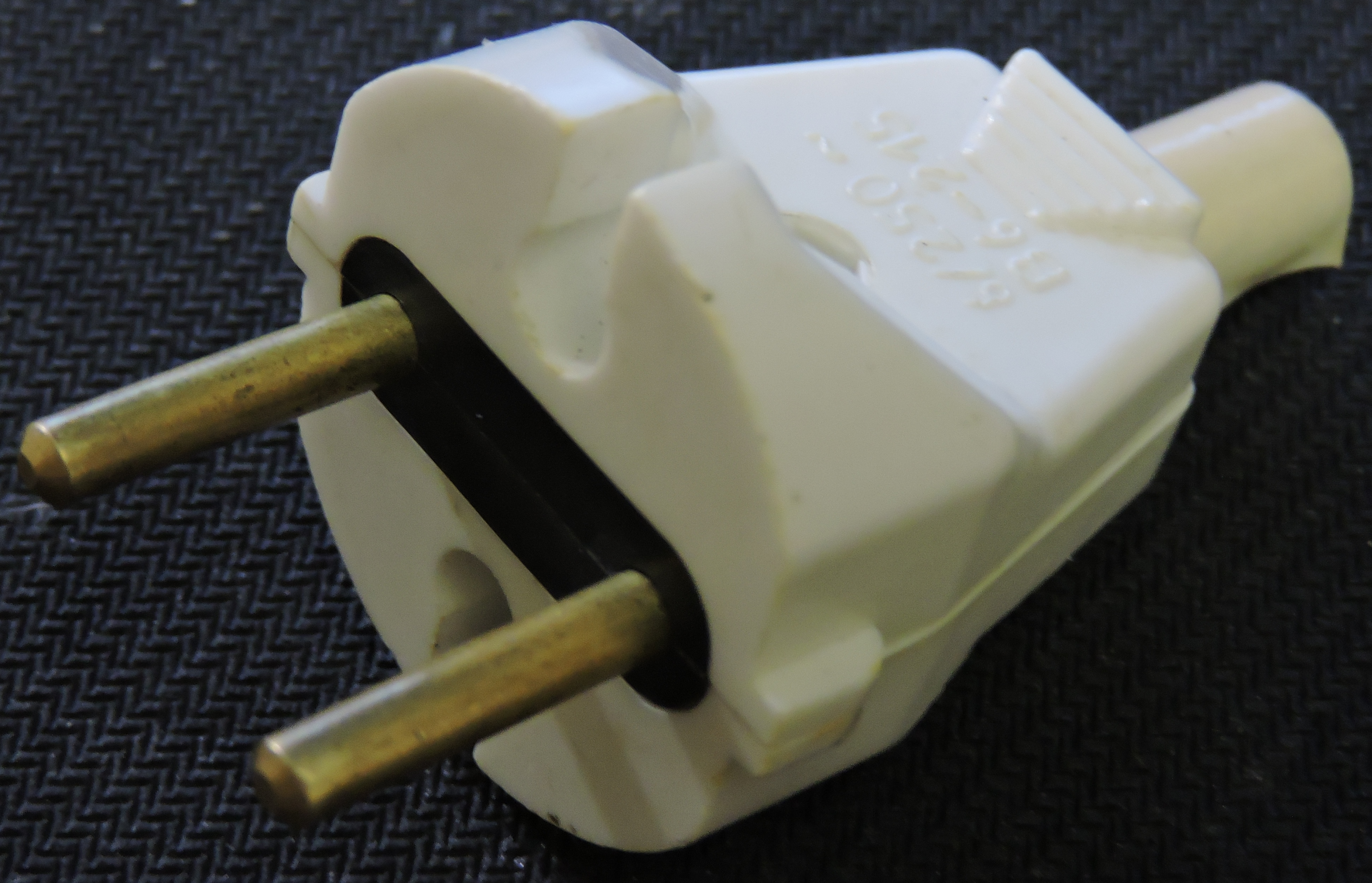 Штепсельная вилка В6-215. Рассчитана на ток силой 6 А и напряжением 250 В. Совместима для использования с розетками типа Schuko